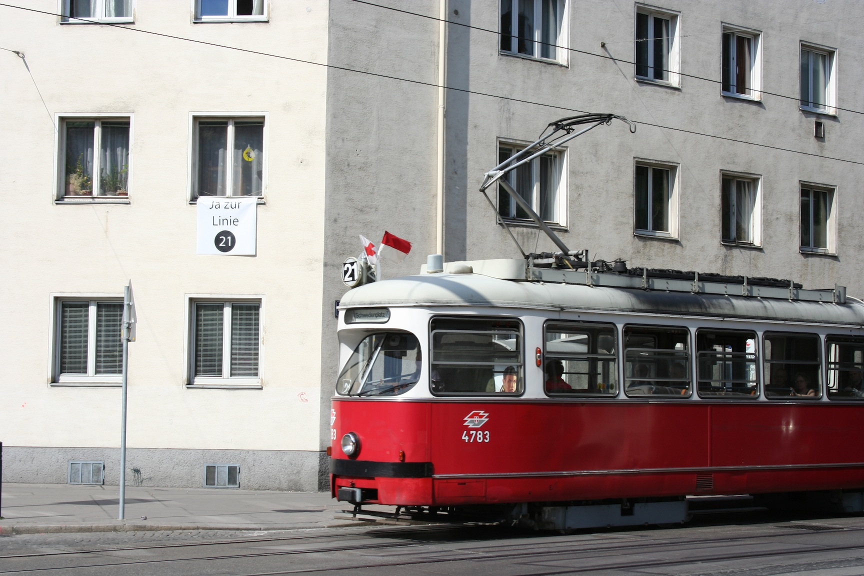 Stiller Protest gegen die Einstellung der Straßenbahnlinie 21, vermutlich Mühlfeldgasse